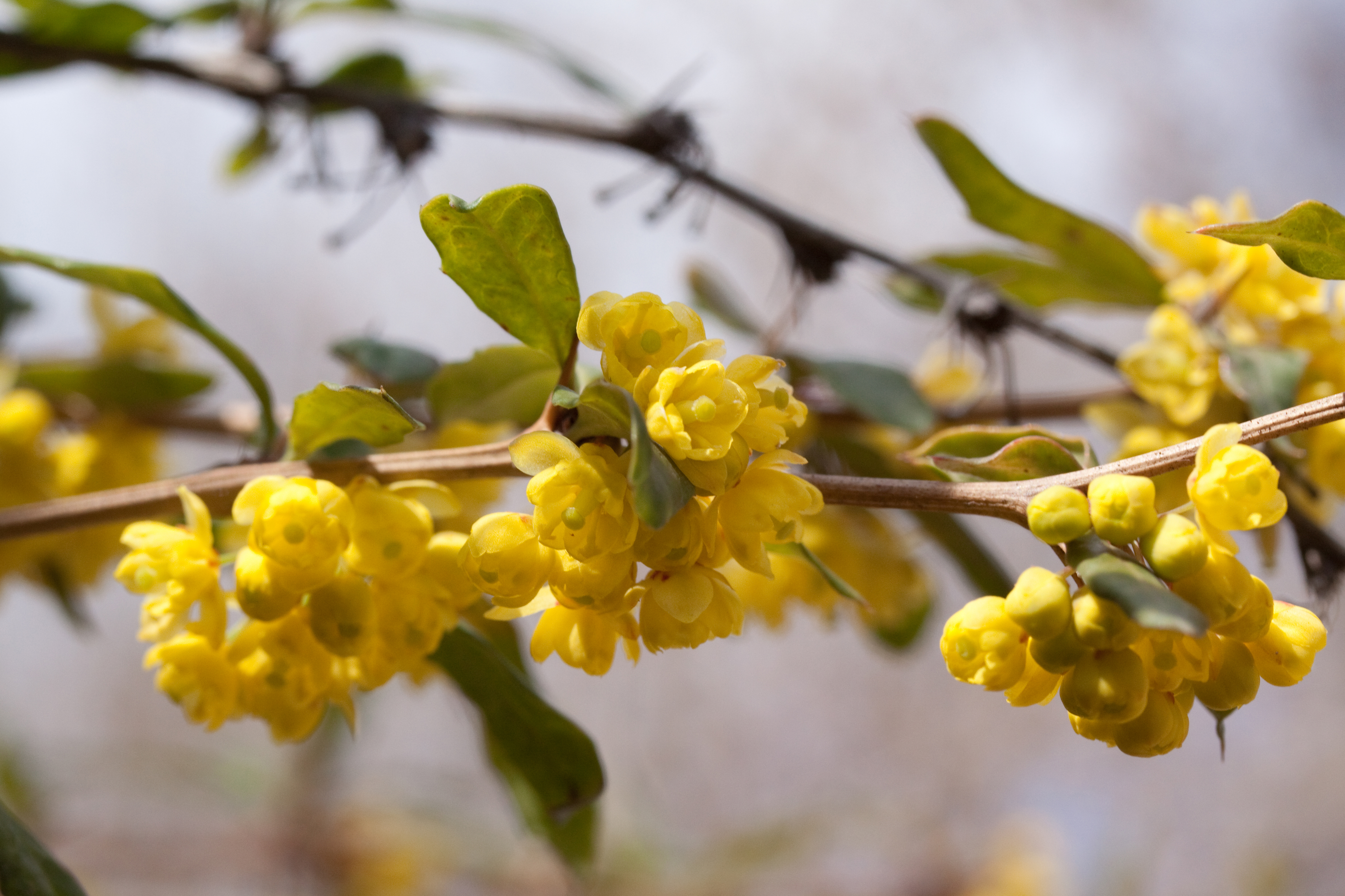 Fleurs de Berberis julianae - Jardin des Plantes - Paris - France